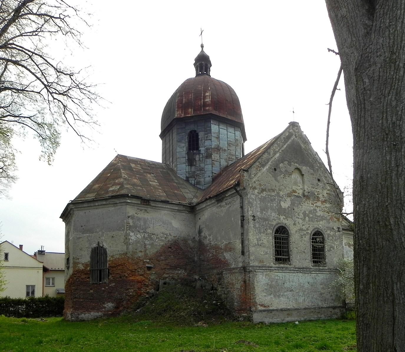 Cerkiew św. Onufrego.